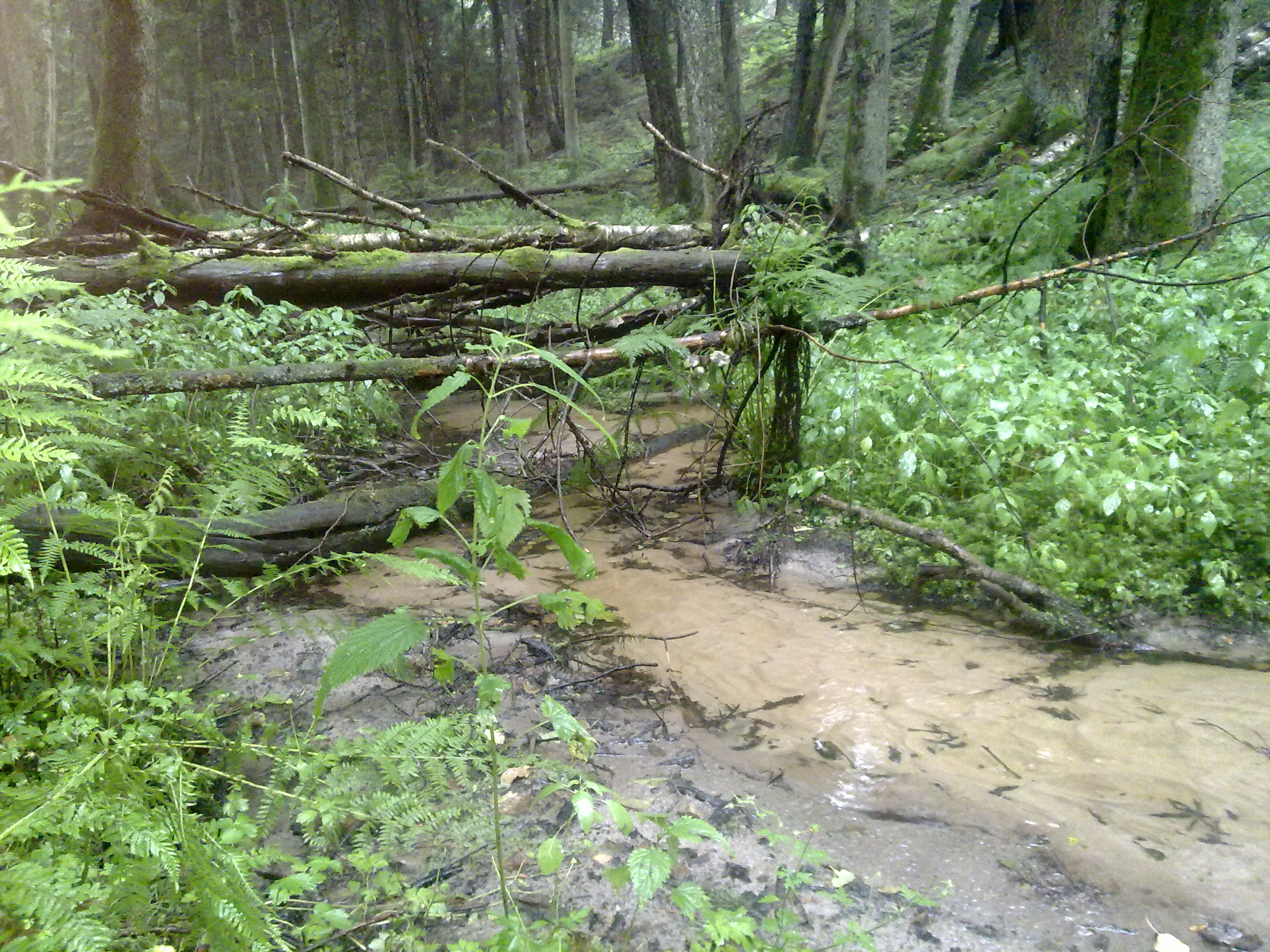 Vilko šaltinis